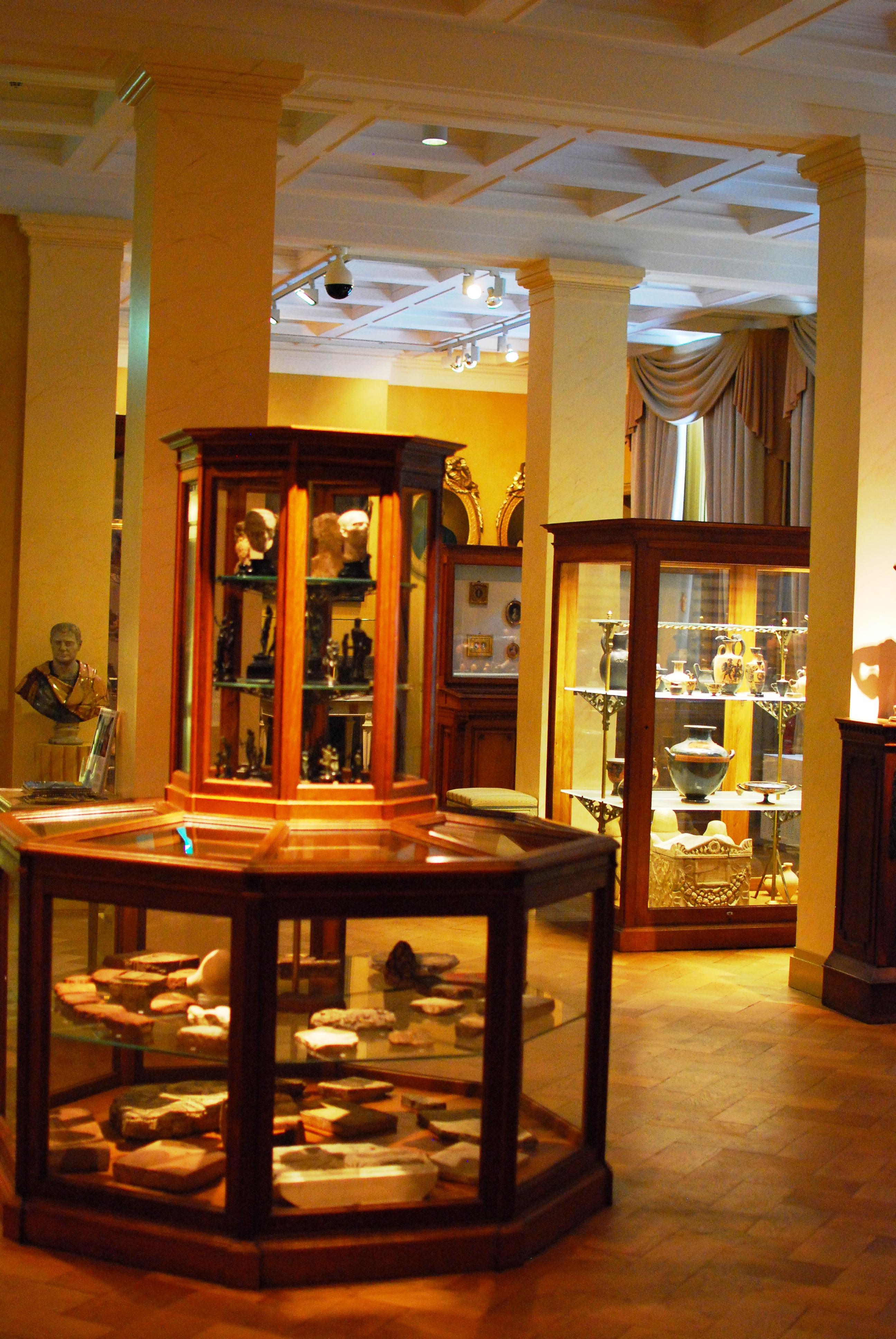 Exhibition room in Museum Meermanno, Prinsessegracht 30, Den Haag.